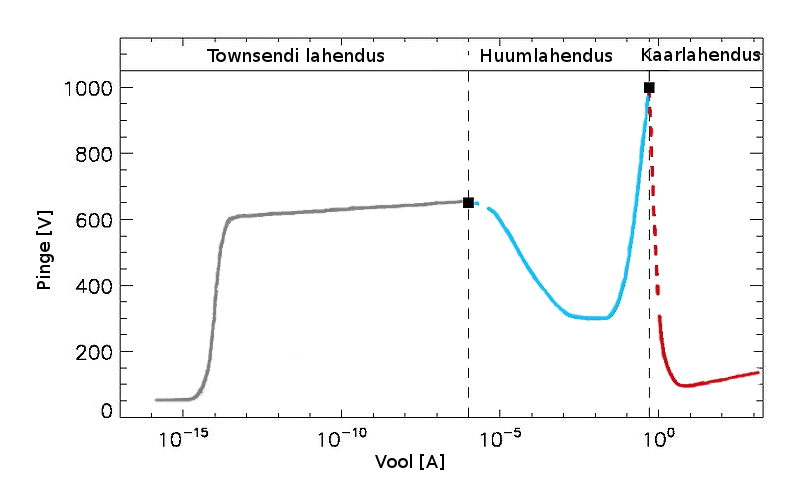 Joonisel on kujutatud erinevaid gaaslahenduse etappe. Väikseima voolutugevusega on Townsendi lahendus, voolu suurenemisel toimub üleminek huumlahendusse ja kui voolutugevus suureneb veelgi, siis jõuab lahendus lõpuks kaarlahendusse. Townsendi lahendusele on iseloomulikud väga väikesed voolutugevused. Townsendi lahendus tekib madalamatel rõhkudel, kõrgematel rõhkudel toimub läbilöök gaasis striimermehhanismi läbi. Huumlahenduse korral on lahendusele jääva pinge väärtused erinevate voolutugevuste juures muutlikud ja kaarlahendusele üleminekul langeb see pinge oluliselt gaaslahenduse takistuse olulise vähenemise tõttu.